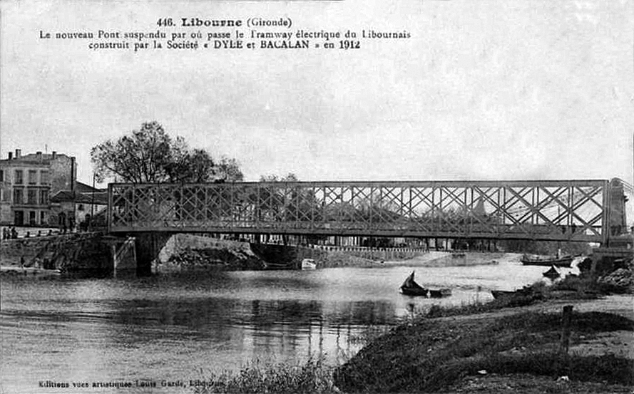 Le nouveau pont métallique, à côté de l'ancien pont suspendu, construit en 1912 pour la ligne de tramway de Saint-André-de-Cubzac à Libourne et à Puisseguin.